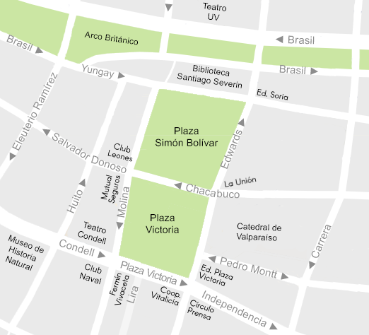 Sección del mapa del plan urbano de Valparaíso entorno al sector de Plaza Victoria, Barrio El Almendral